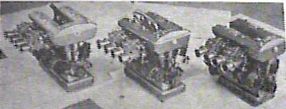 Motore Bandini 750 c.c. prima serie tratta da Libro: Bandini (storia della vita e automobili di Ilario Bandini)